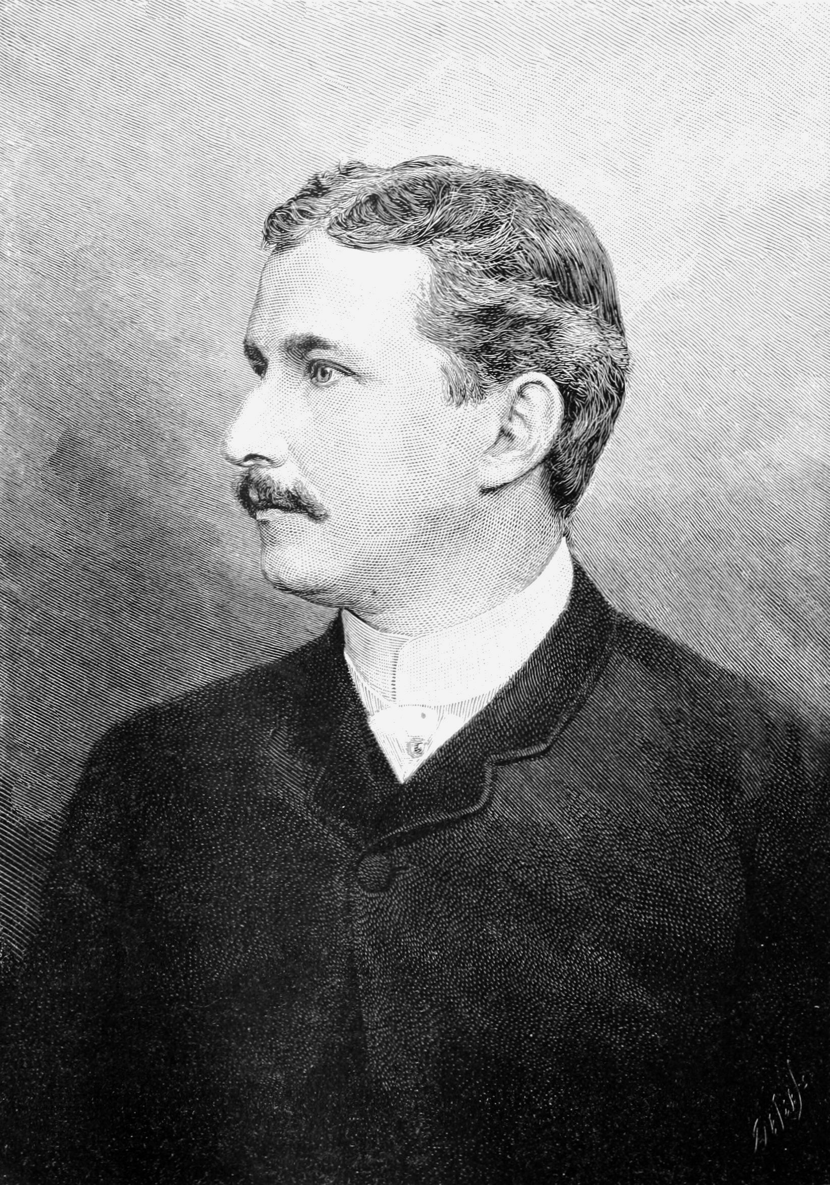 Henry Carwill Lewis